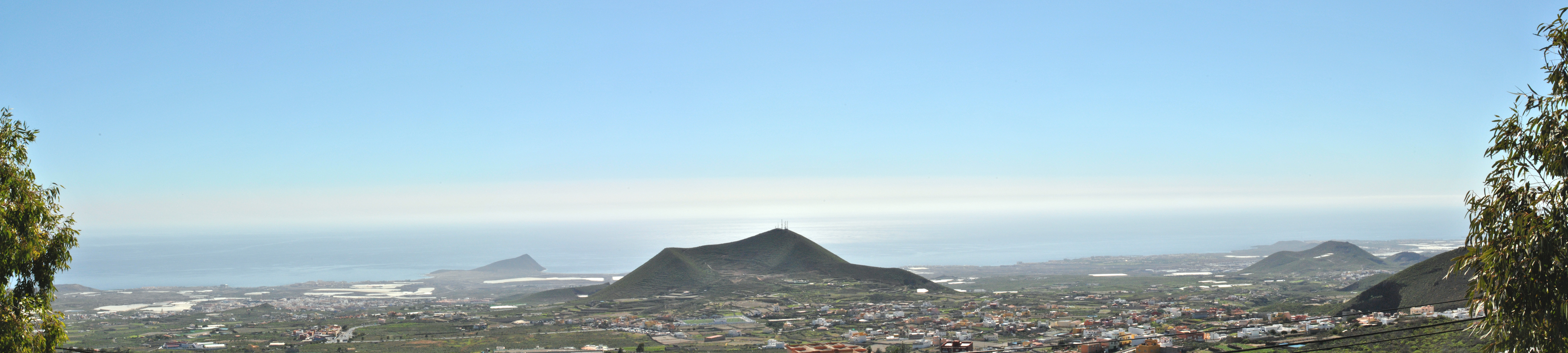 Vista del valle de Granadilla al comenzar la subida hacia Vilaflor y el Teide.